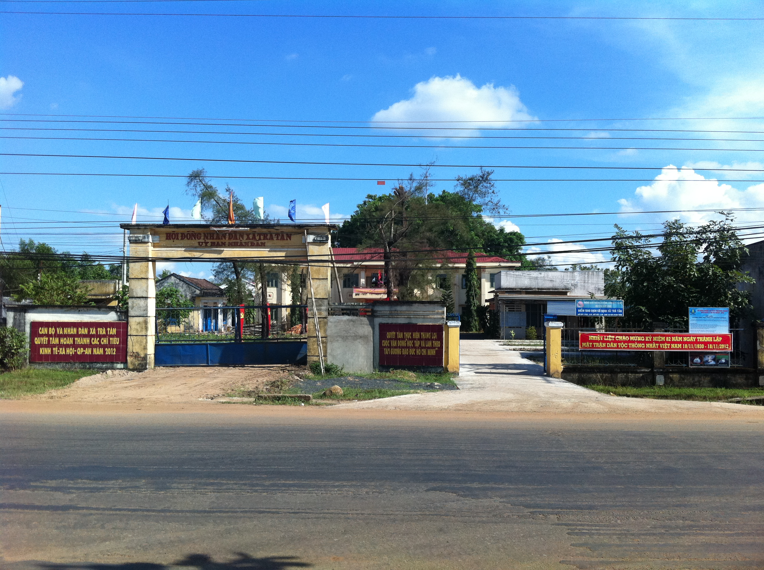 UNBD xã Trà Tân, Đức Linh, Bình Thuận